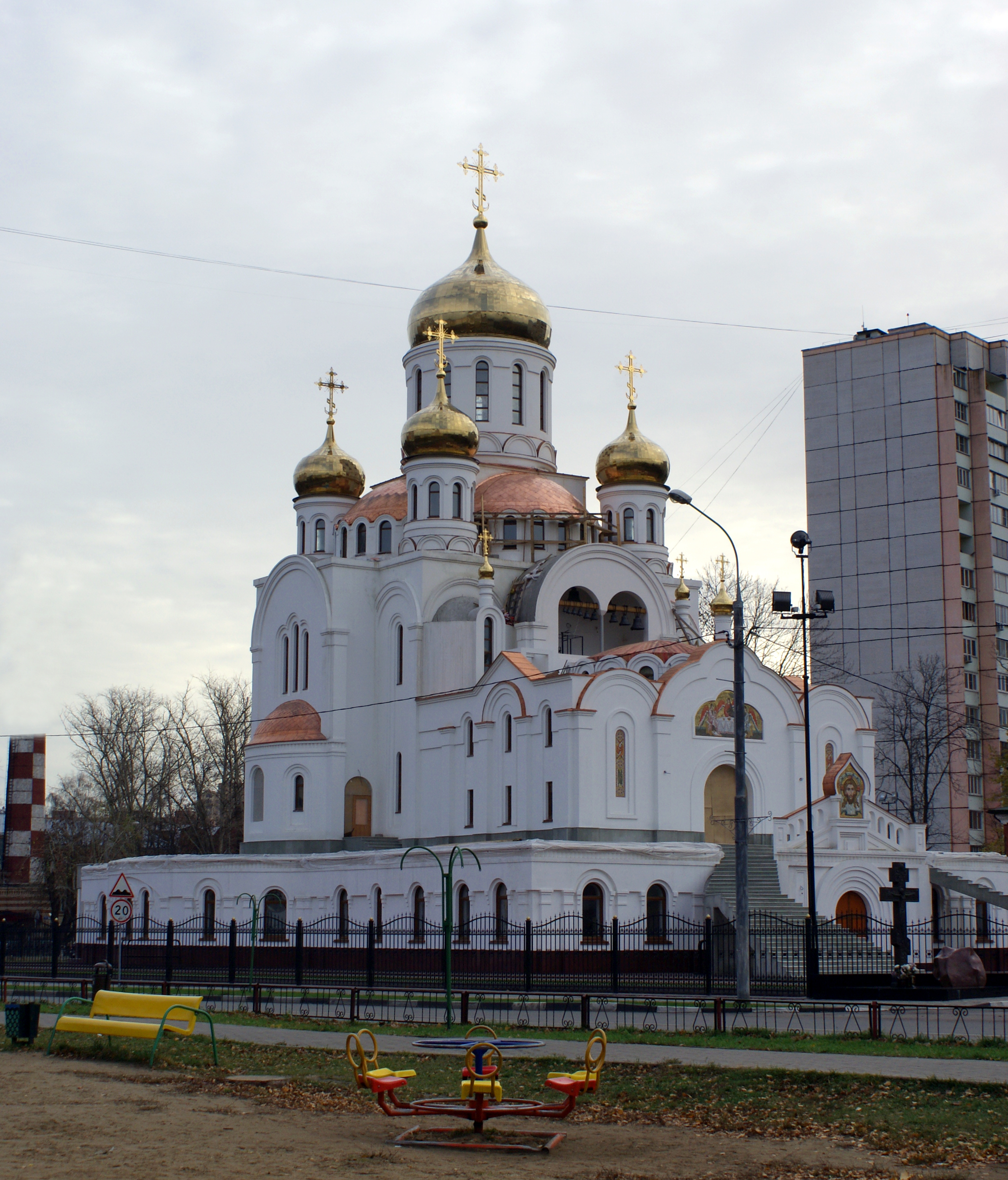 Храм Троицы Живоначальной (Реутов)